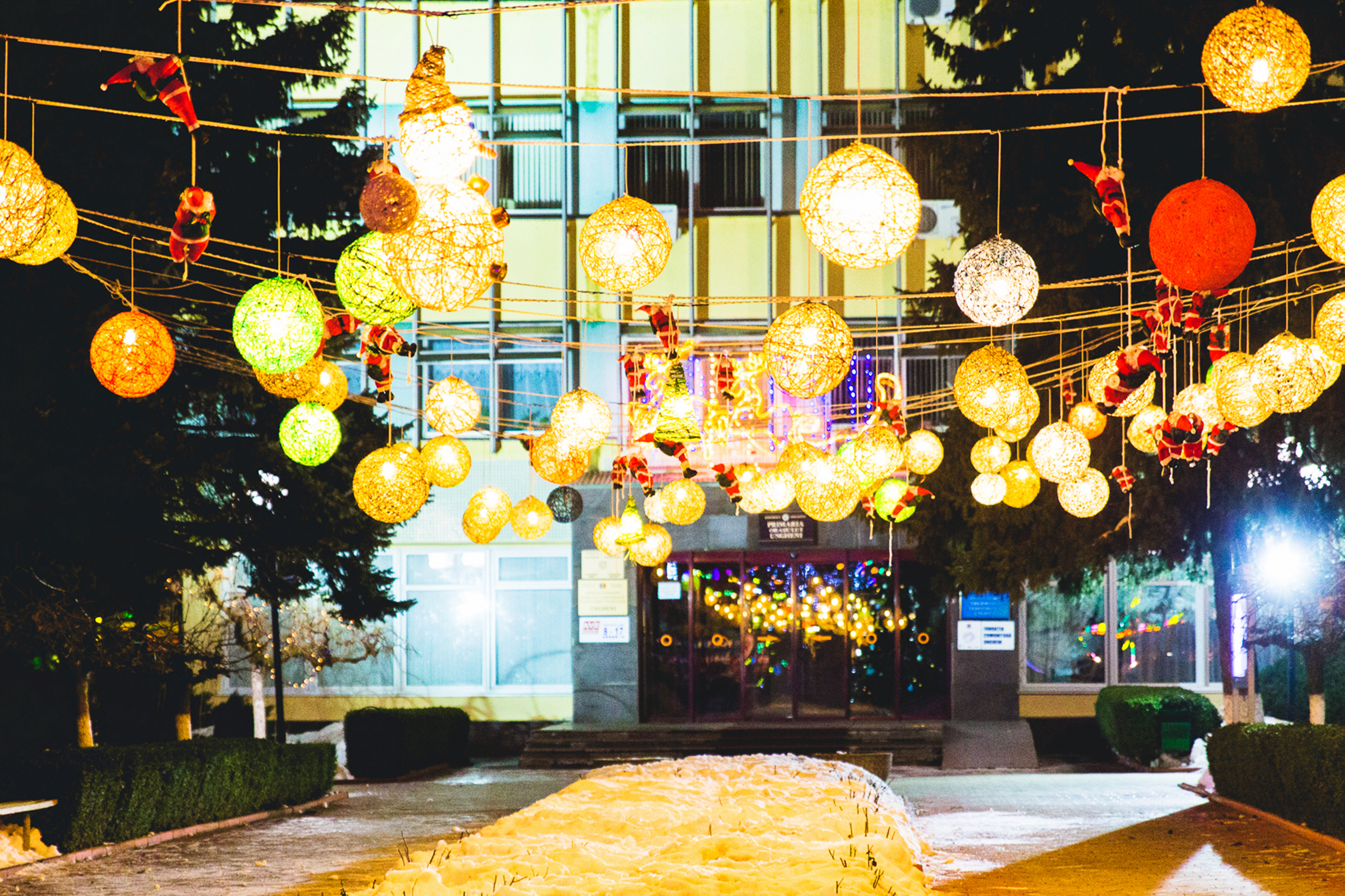 Ungheni spre Anul Nou 2015. Primaria Ungheni